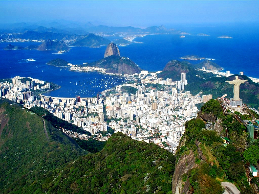 Vue aérienne de Rio de Janeiro : le Corcovado et la statue du Christ Rédempteur et le Pain de Sucre